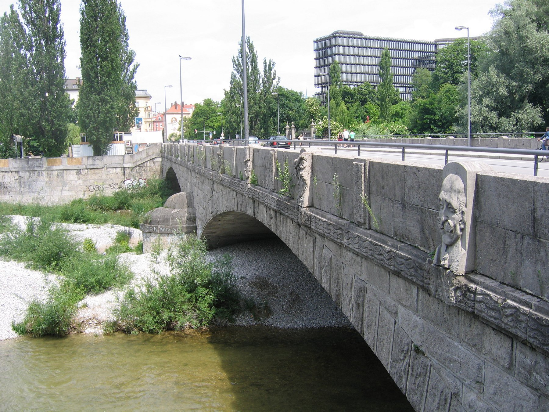 Corneliusbruecke in München, im Hintergrund das Europäische Patentamt